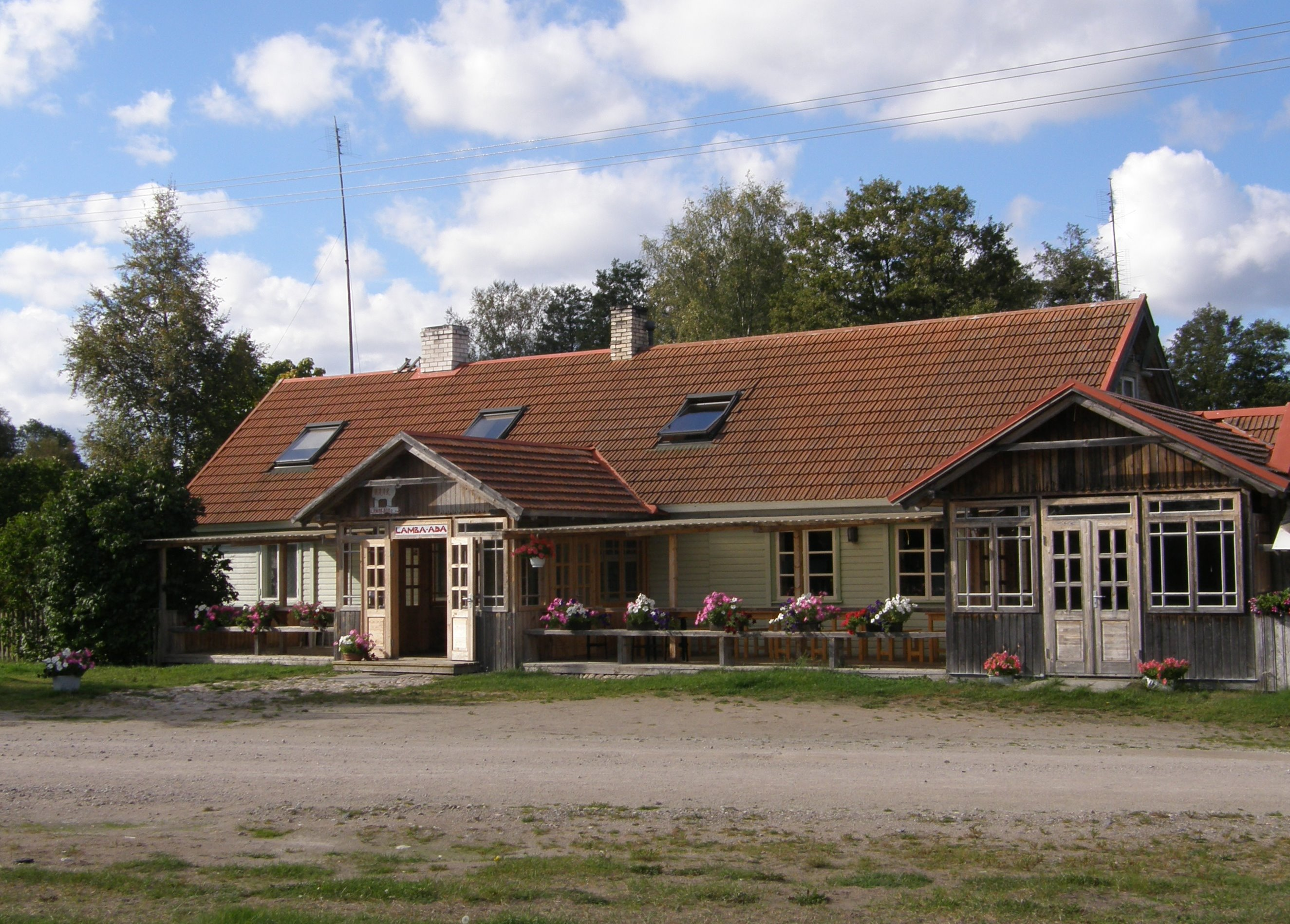 Lamba-Ada rannabaar